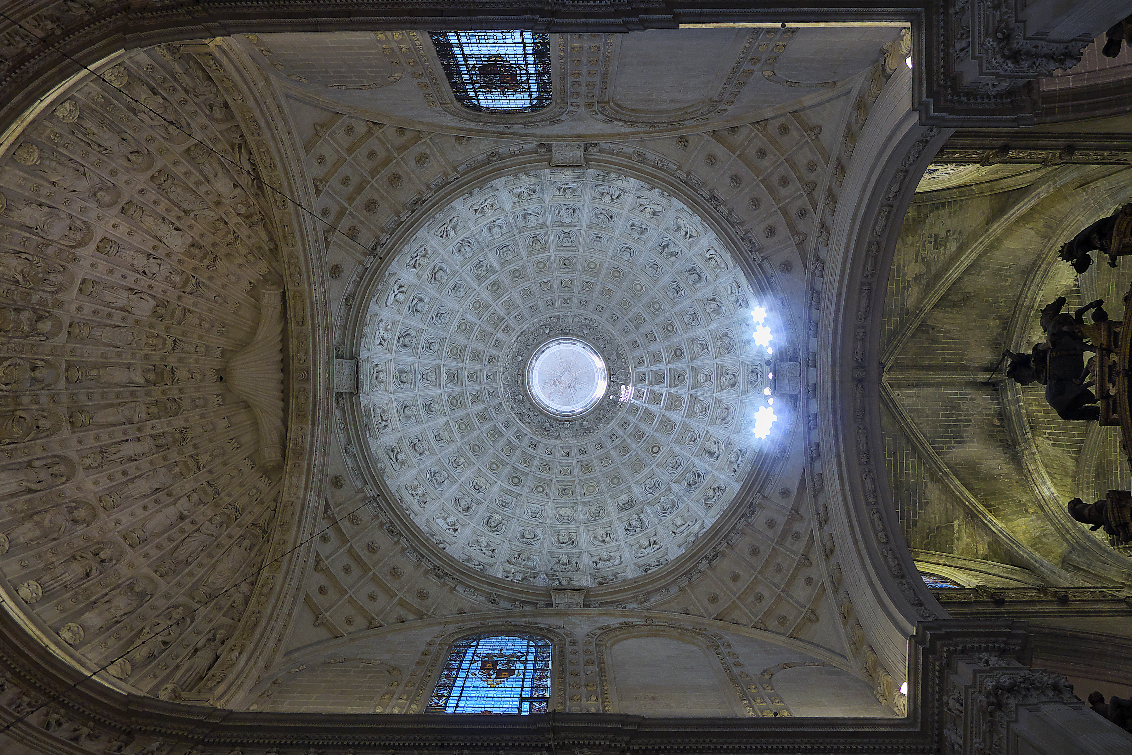 En el año 1575 se culmina el abovedamiento de Hernán Ruiz II para la Capilla Real de Sevilla. Dos muros colaterales decorados con ventanas y sobre pechinas, cúpula de casetones sin anilla de vanos y culminada con linterna.